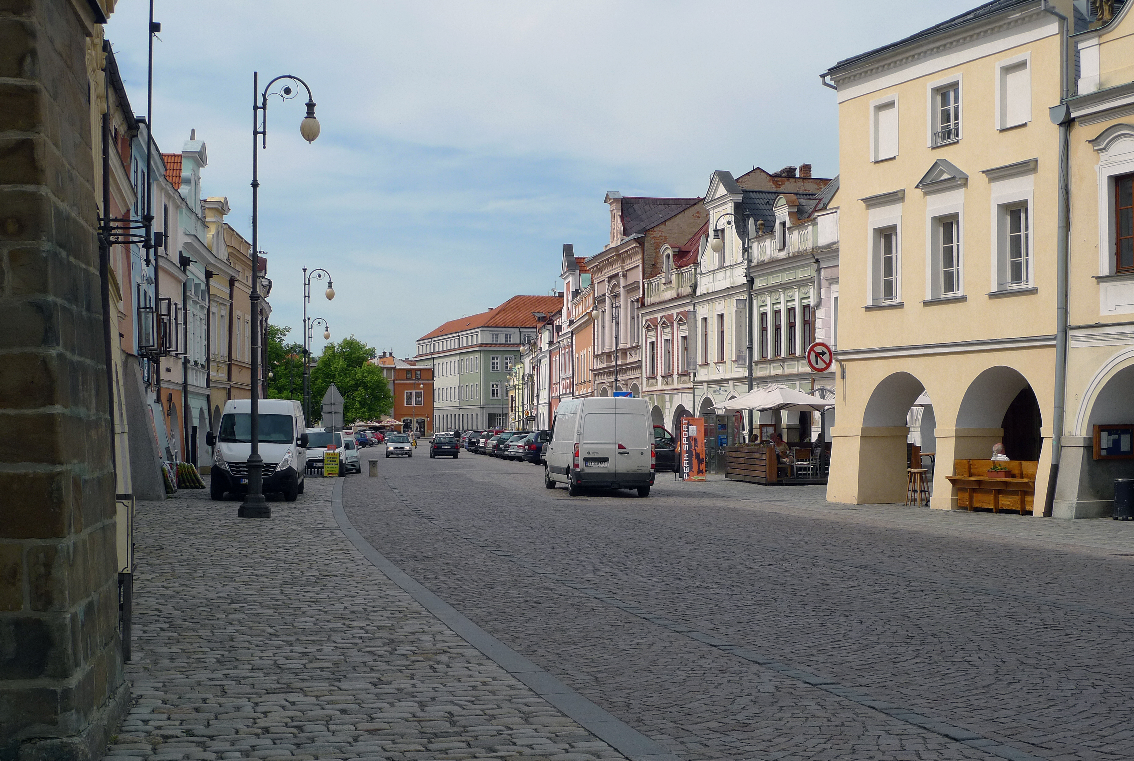 Smetanovo náměstí v Litomyšli